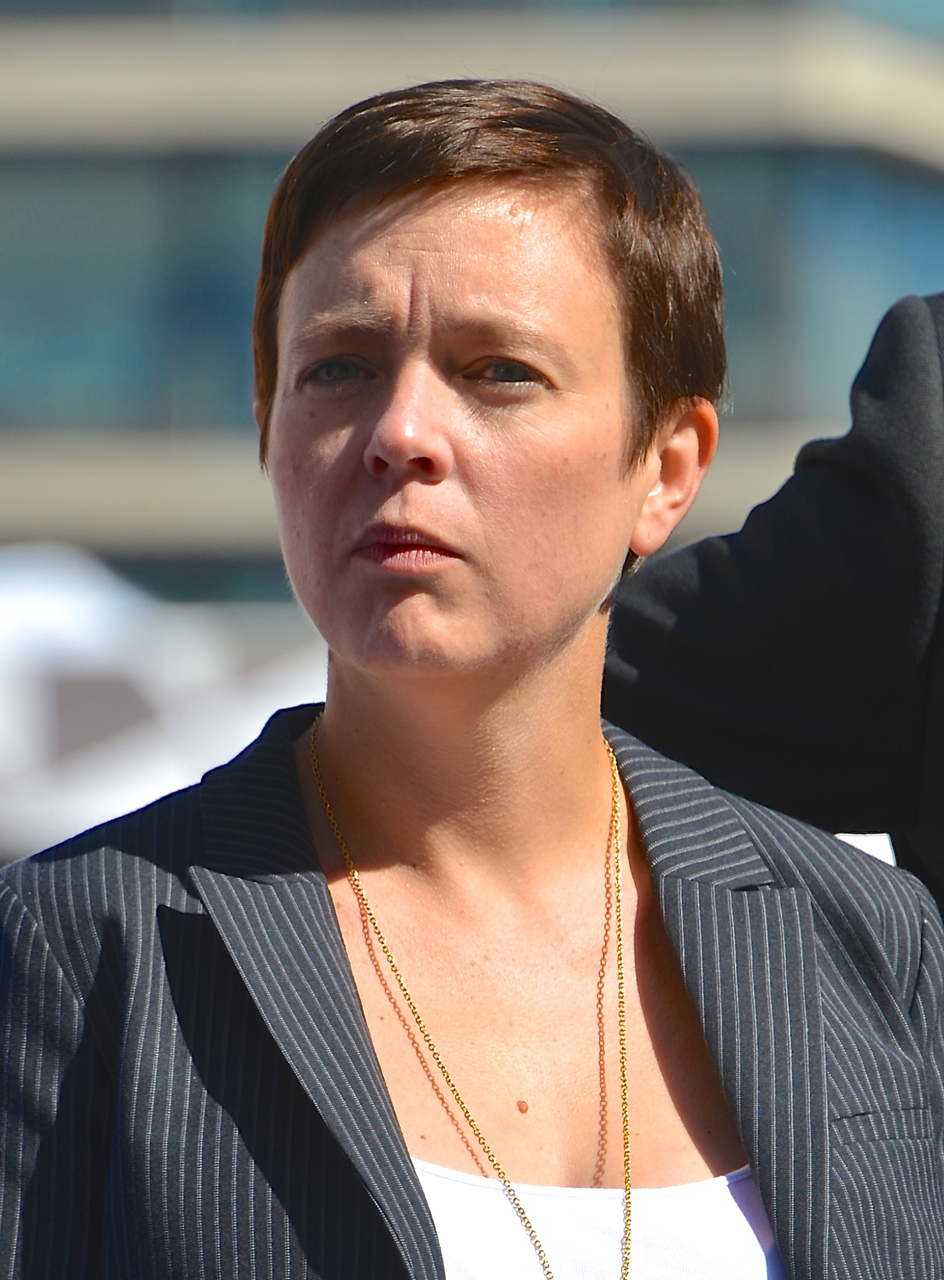 Carolina Frände på Sergels torg under Stockholms Kulturfestival 2013.